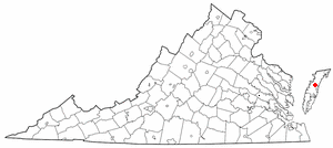 va maps